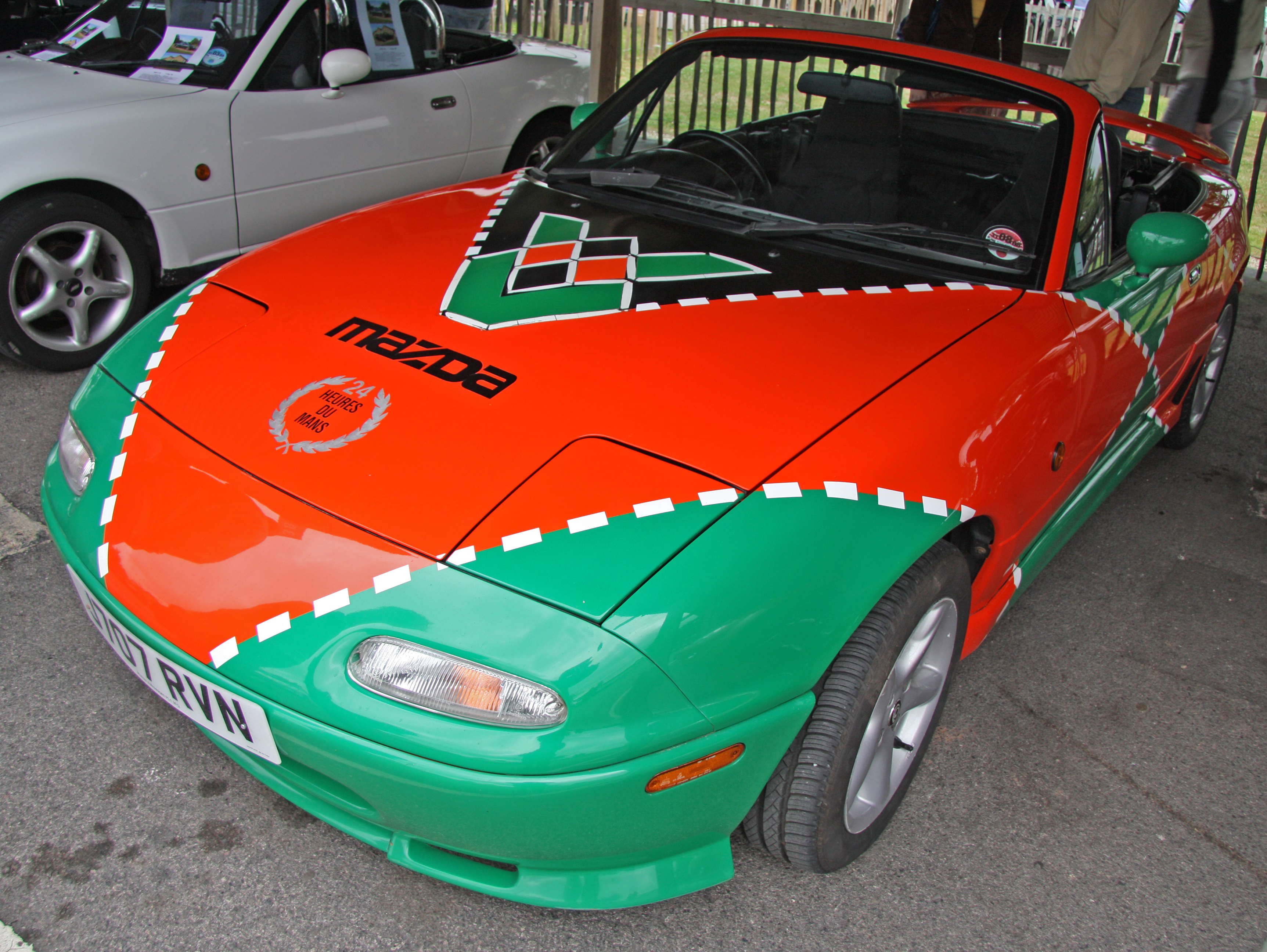 Mazda MX5